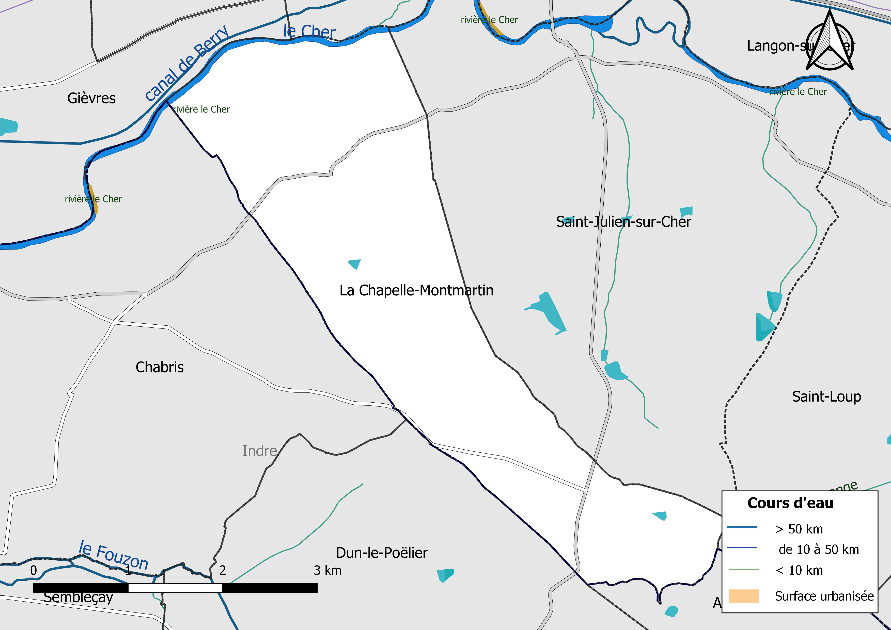 Carte du réseau hydrographique de la commune de La Chapelle-Montmartin (Loir-et-Cher, France).